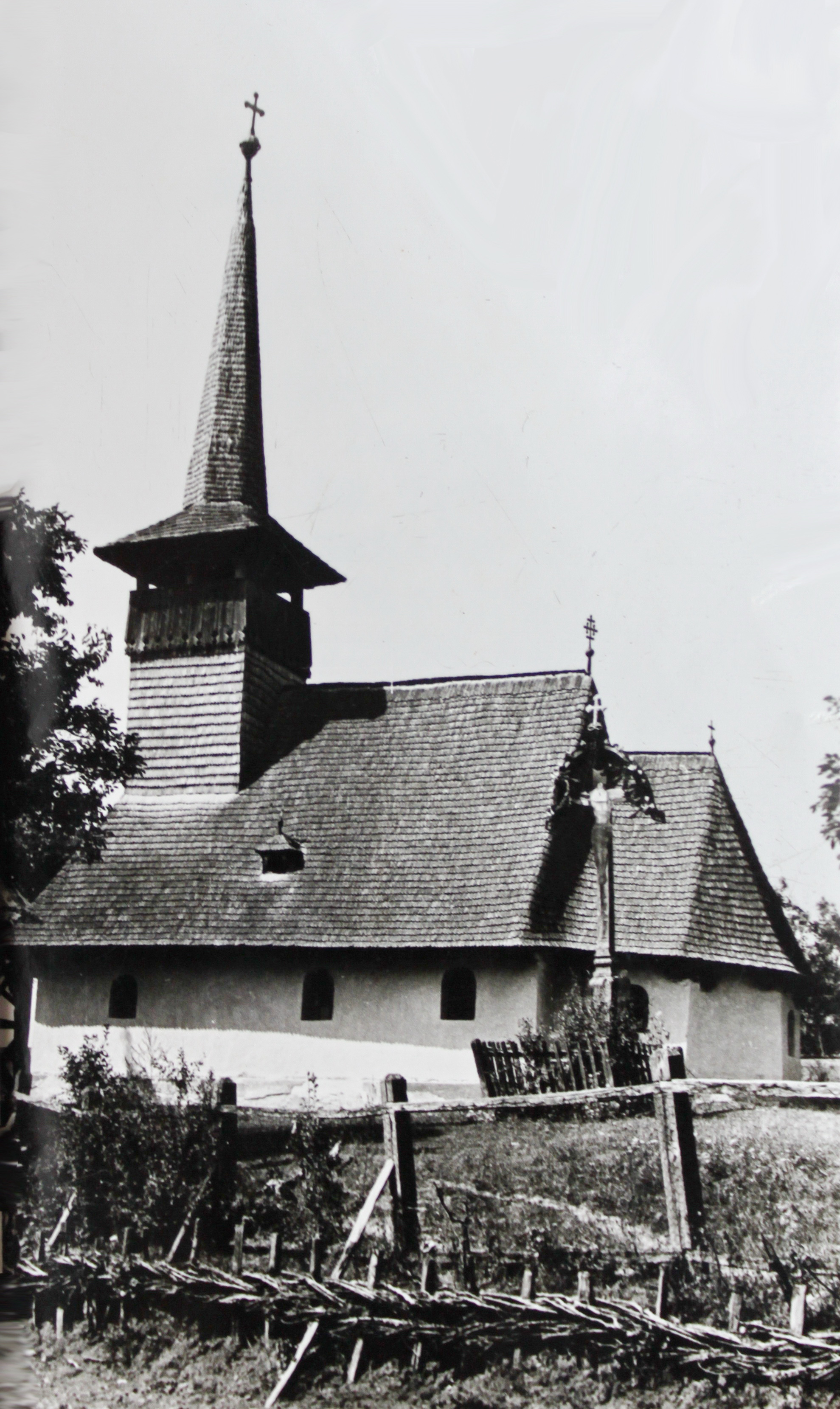 Biserica de lemn din Bobota, județul Sălaj mutată la Corni, județul Maramureș. Biserica nu mai există.